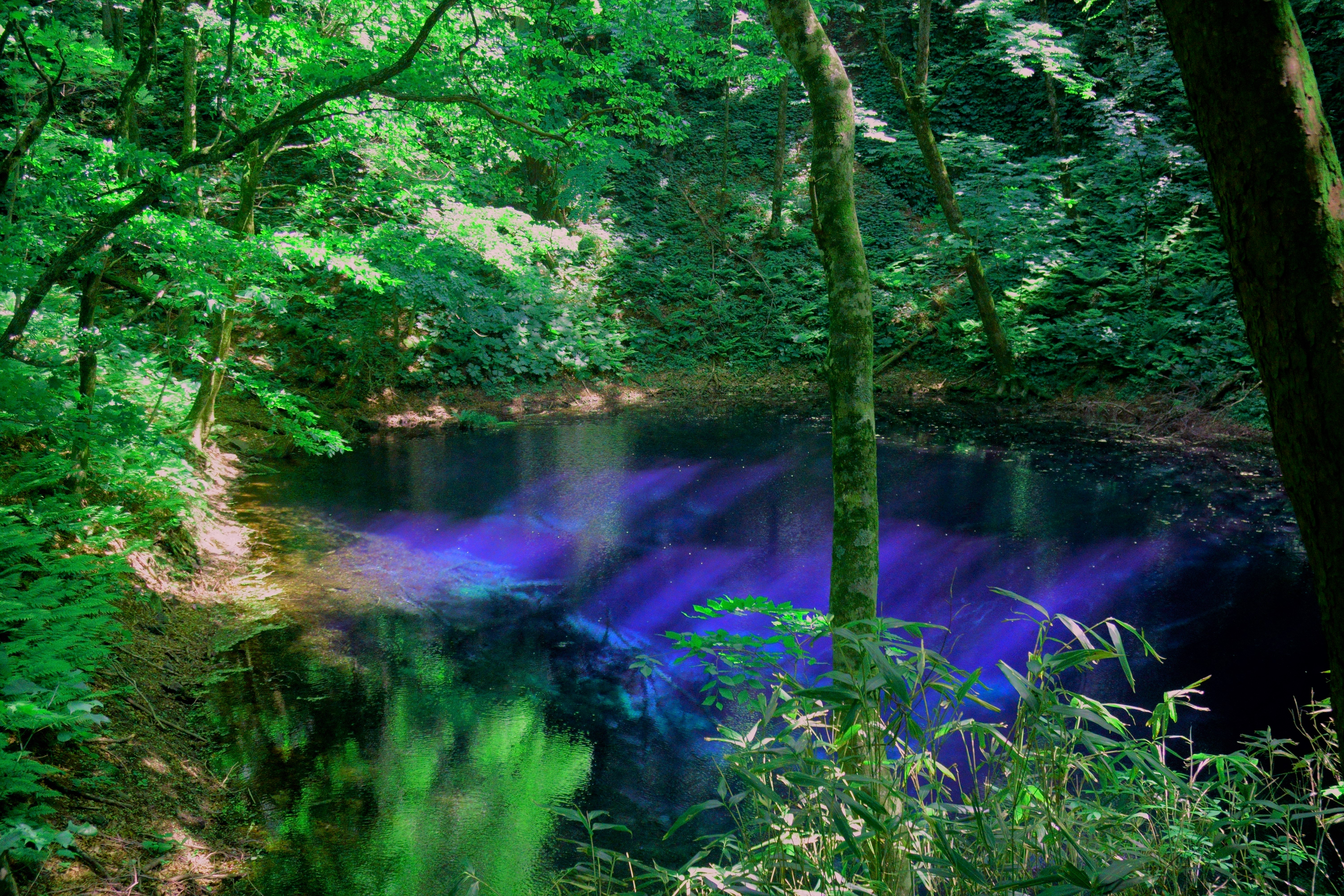 青森県西津軽郡深浦町、十二湖にある池の中でも最も著名な青池。面積はわずか1aにも満たないが、神秘的な深い青の水を湛える。十二湖は白神山地の一角にあるが、世界自然遺産の核心地域外にあり、津軽国定公園内の自然景勝地である。